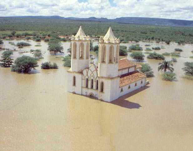 Igreja matriz da antiga Petrolândia - PE(Hoje totalmente submersa nas águas do Velho Chico)